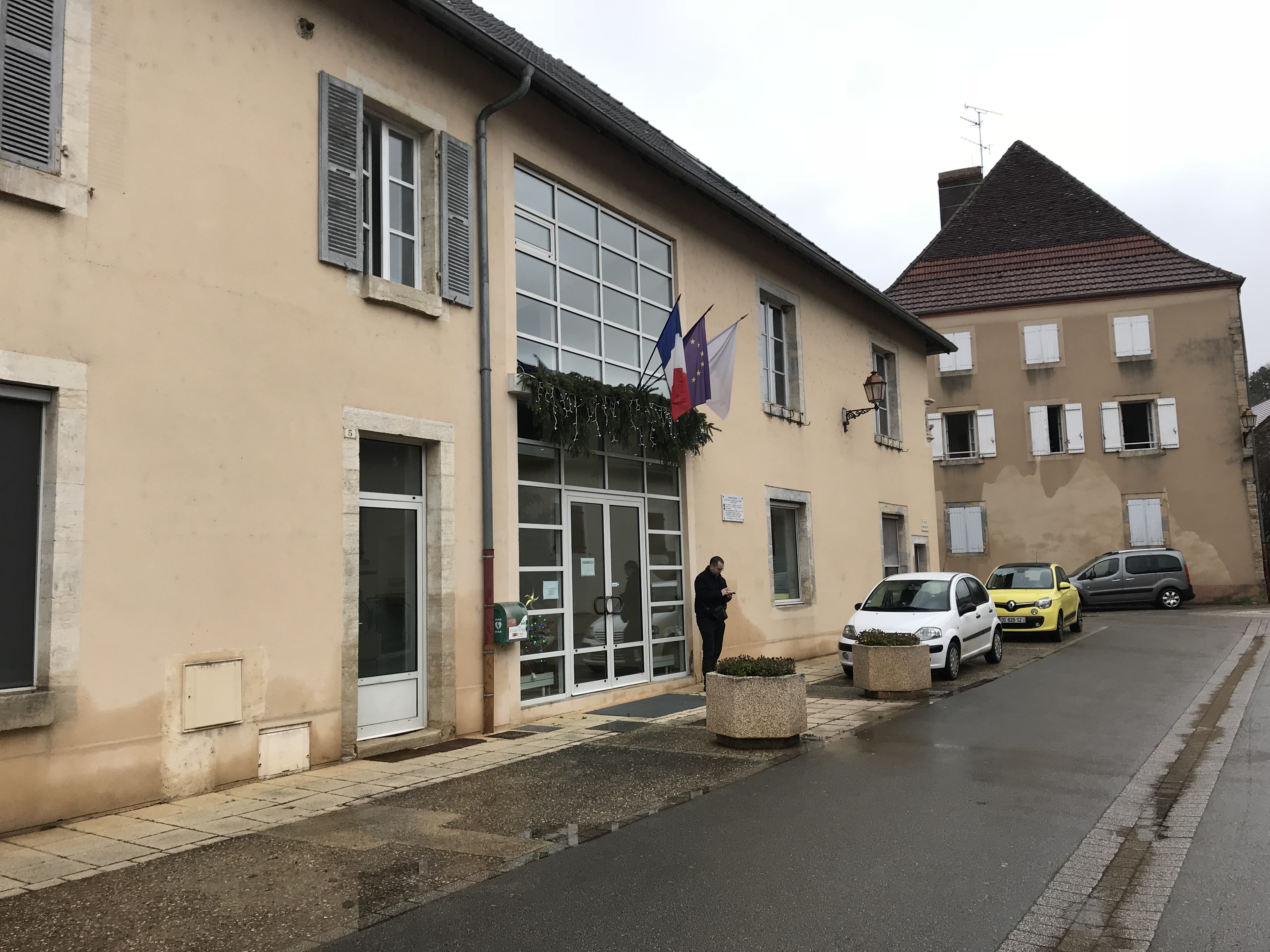 Rochefort-sur-Nenon (Jura) en janvier 2018.